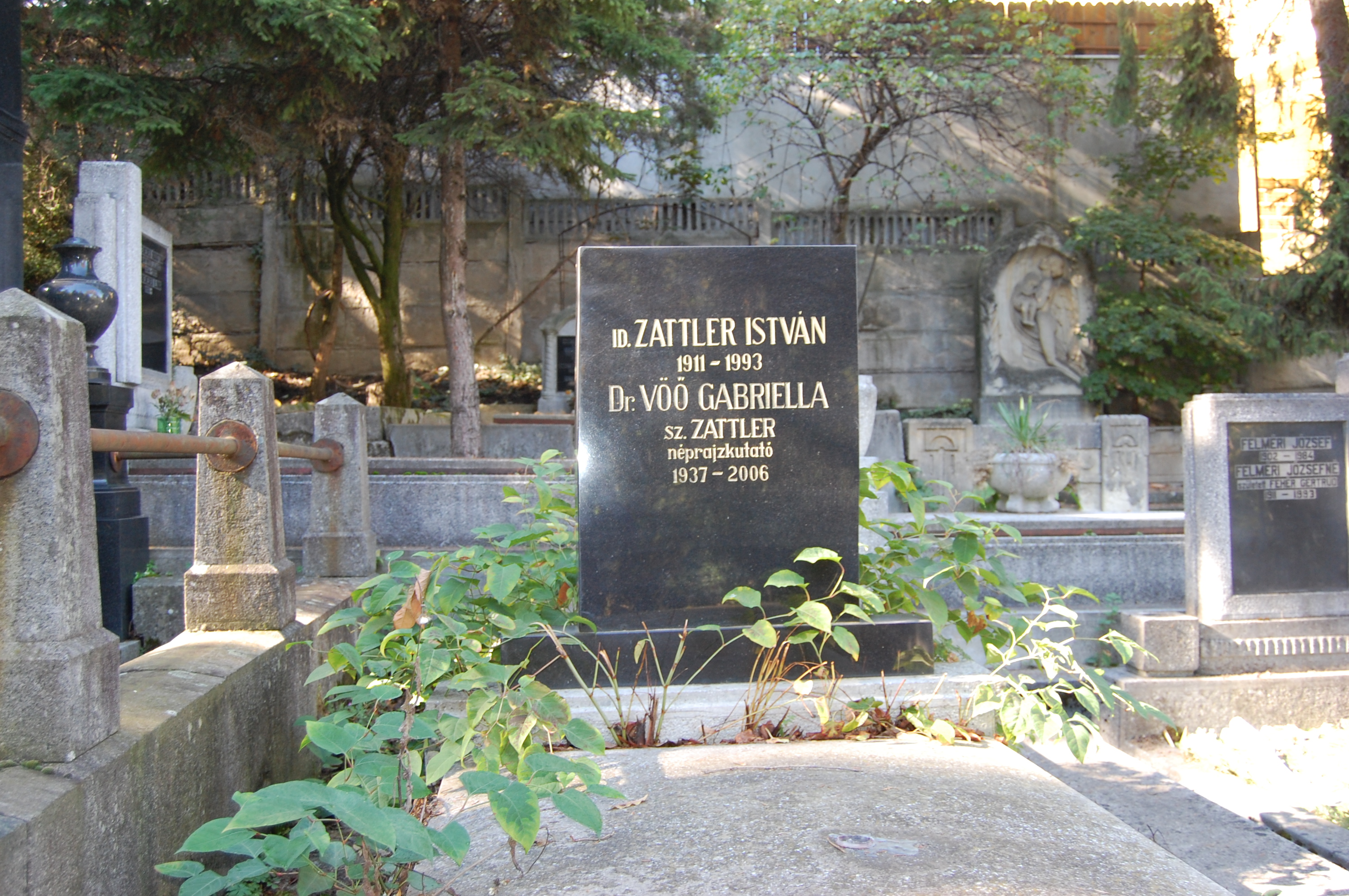 Vöő Gabriella néprajzkutató sírja a Házsongárdban, Kolozsvár